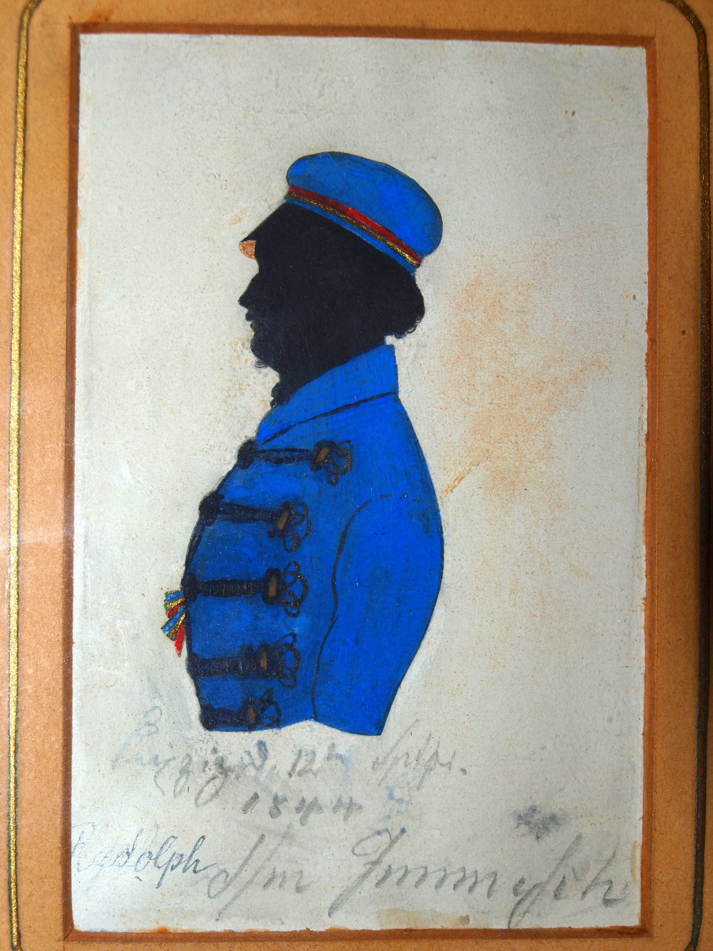 Silhouette des Leipziger Studenten Karl August Eduard Rudolph aus Zittau, Jaroměr Hendrich Imiš gewidmet